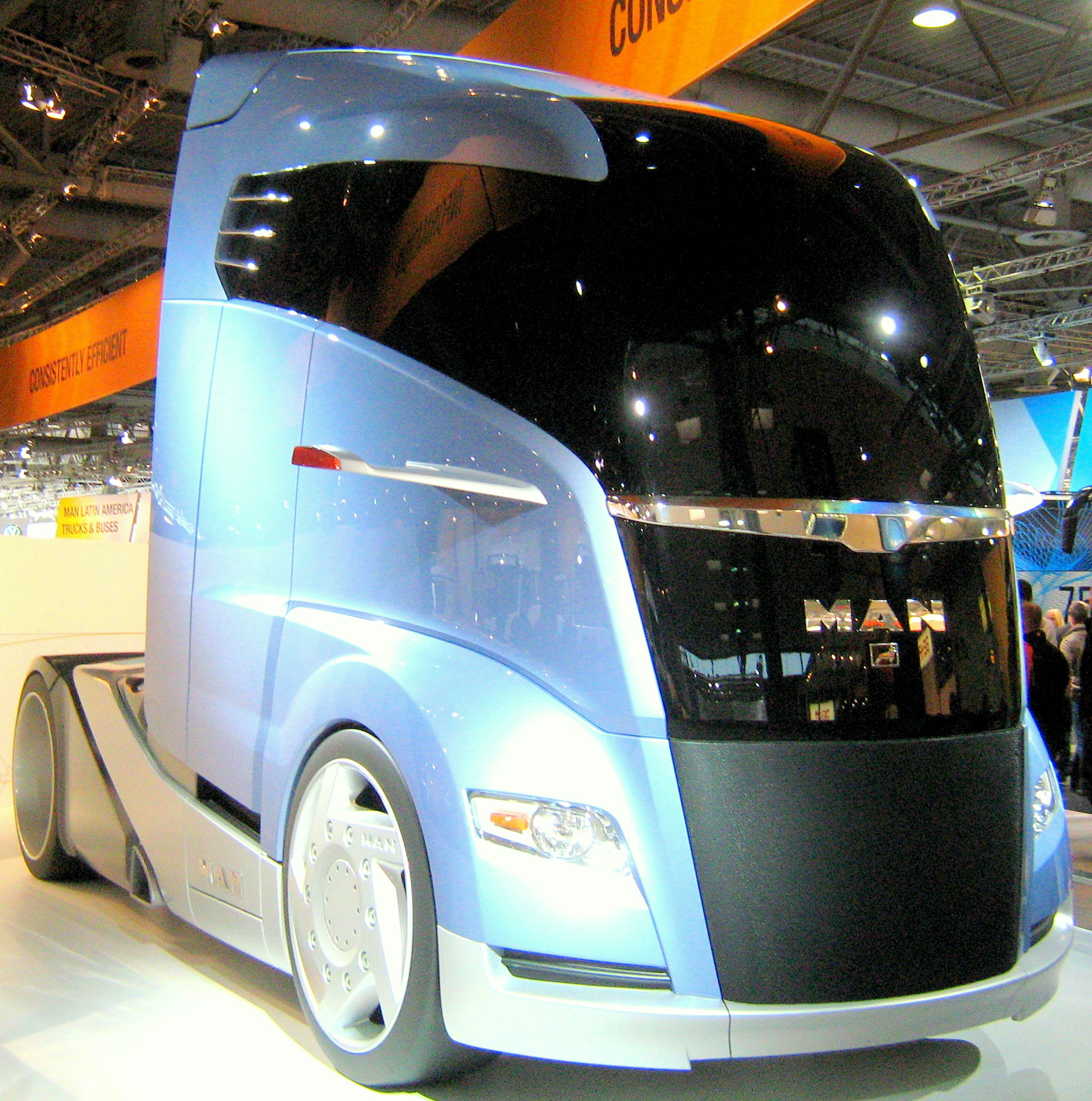 Die aerodynamische MAN Concept S Studie ist nur eine äußerliche Sattelzug Fahrerhaus- Hülle die auf der IAA 2010 in Hannover vorgestellt wurde.